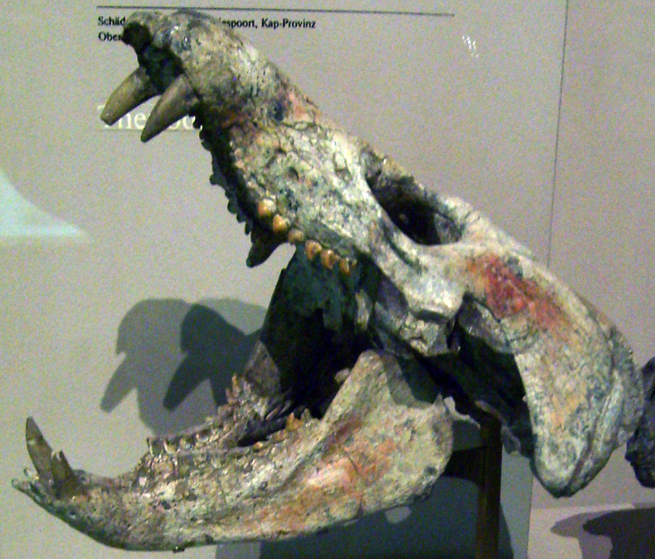 Diademodon mastacus skull at the Museum für Naturkunde, Berlin.